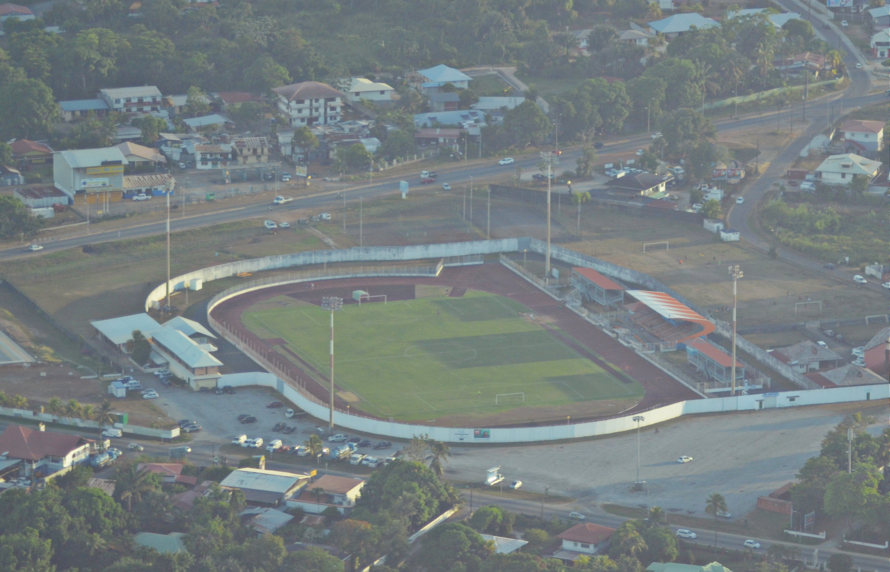 Baduel Stadium